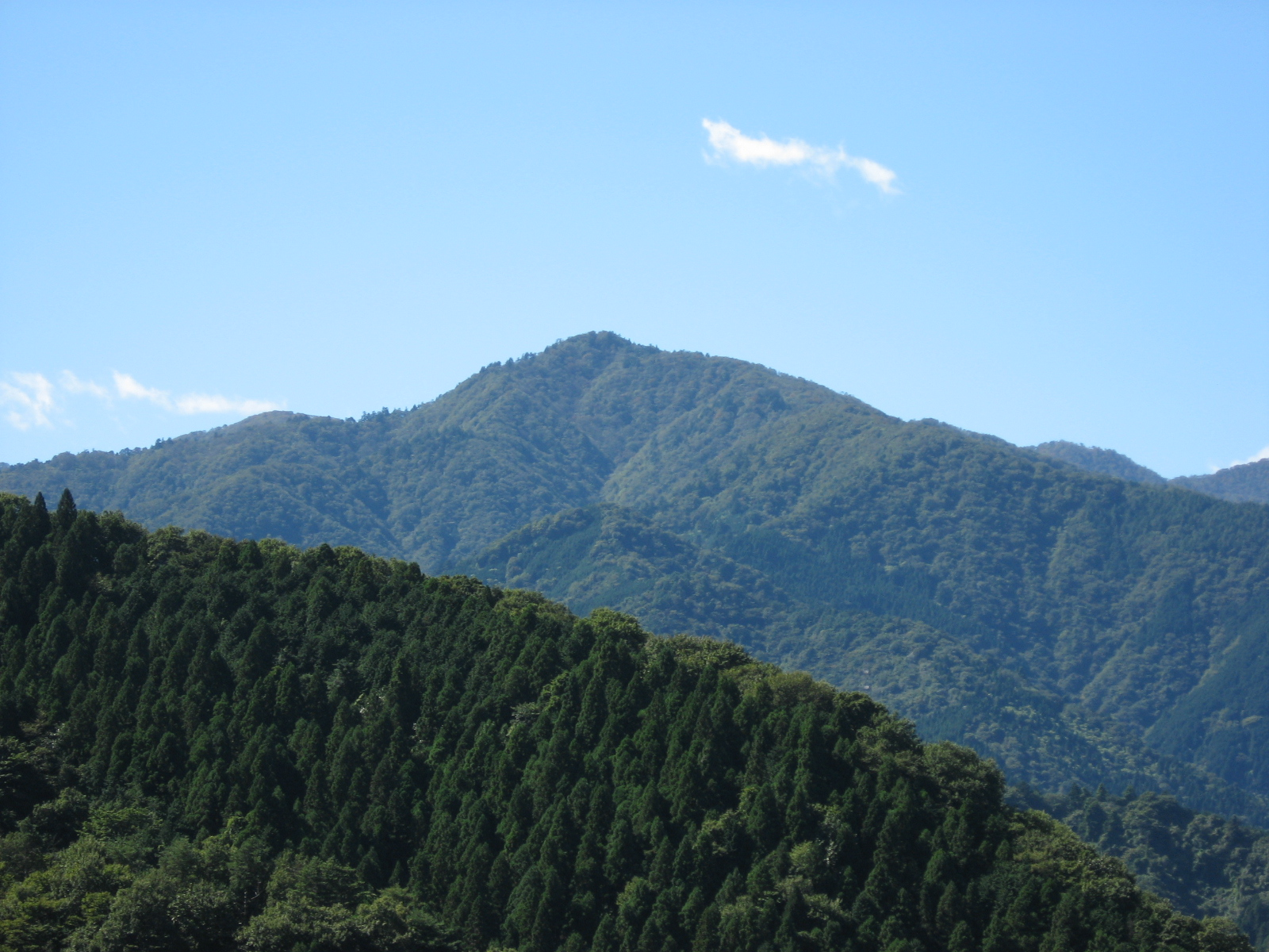 丹沢山地の本間の頭